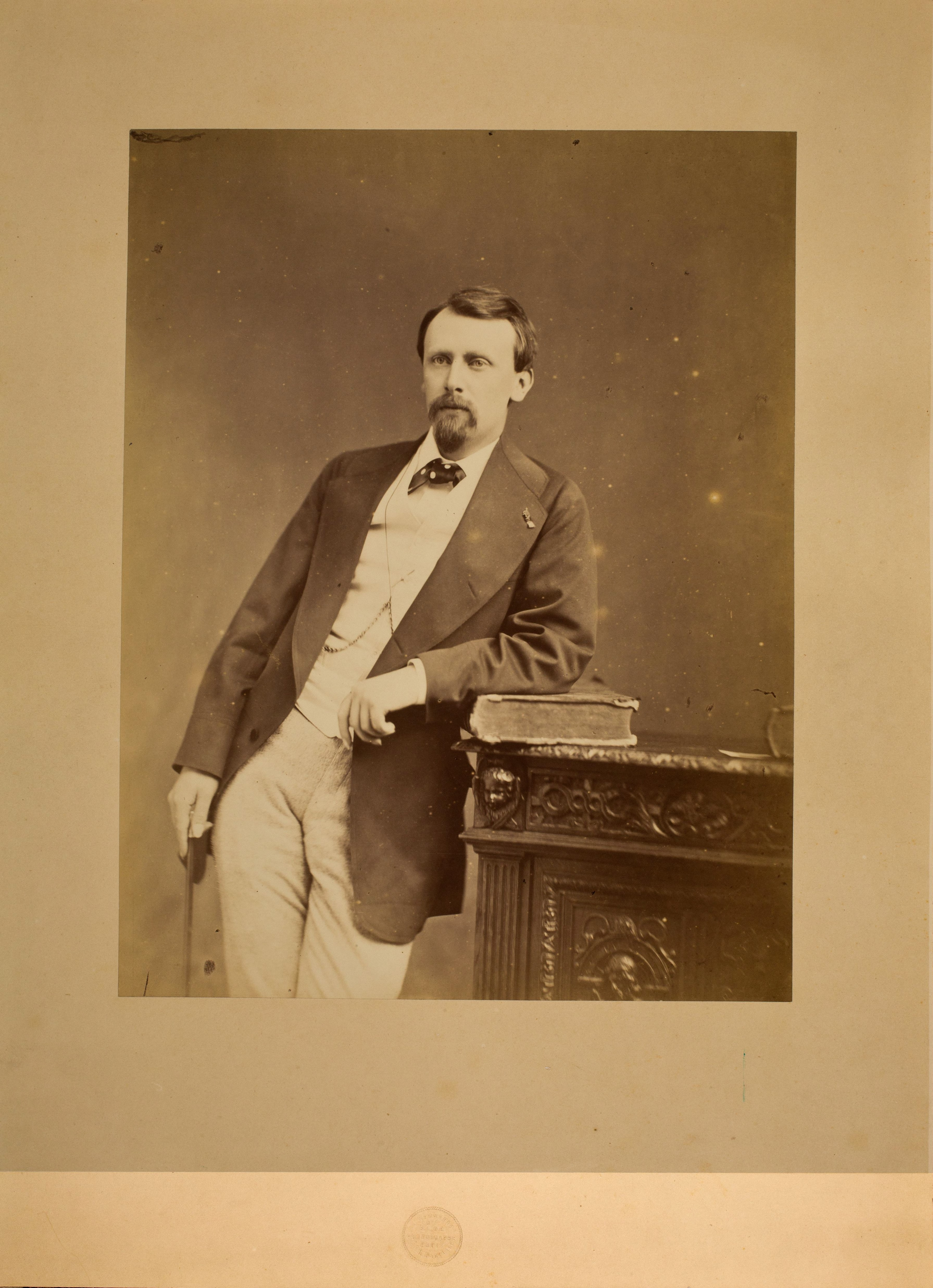 Foto van de Nederlandse kroonprins Willem, overleden in 1879.